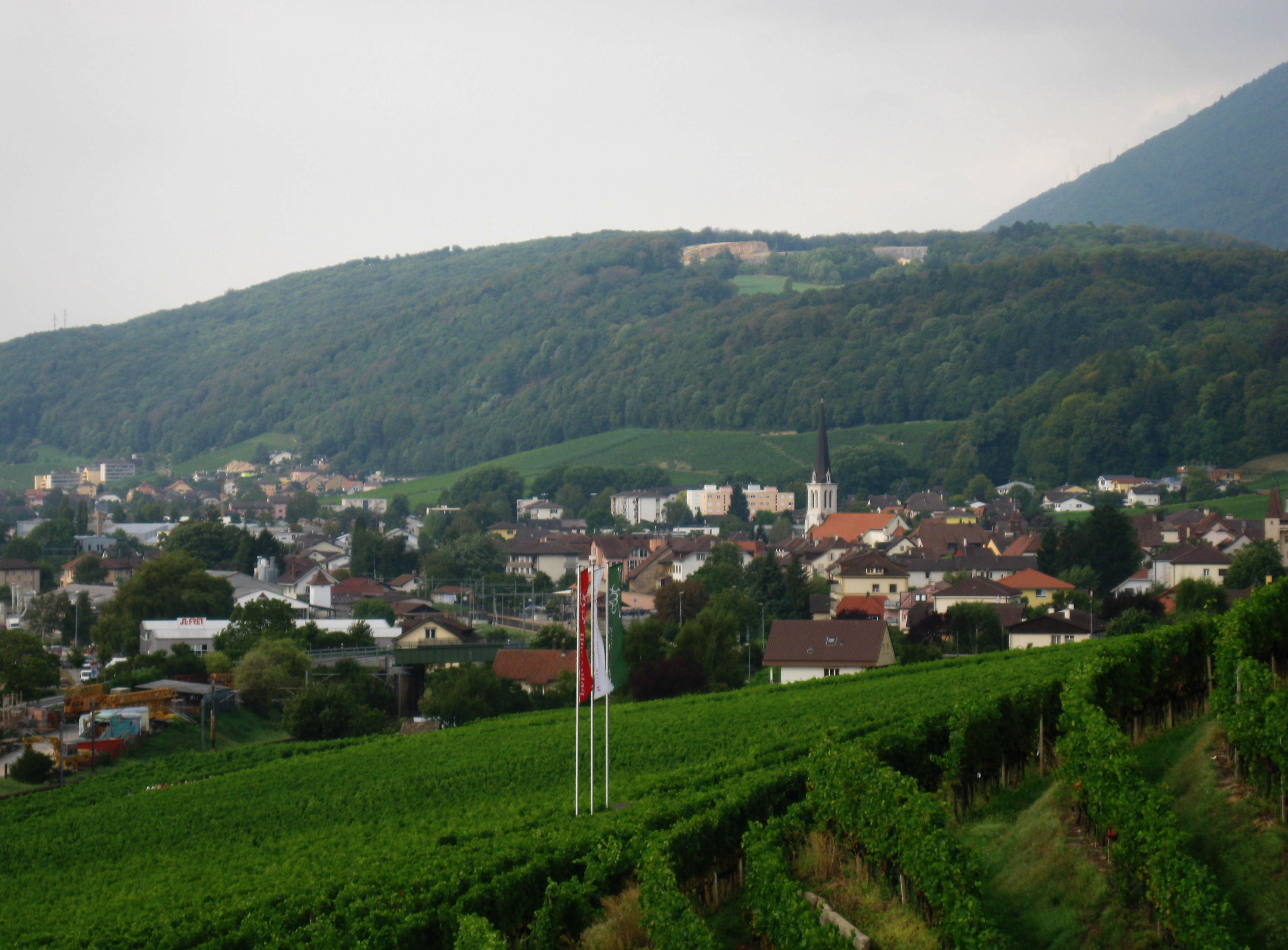 Dorf vom Rebgut aus aufgenommen